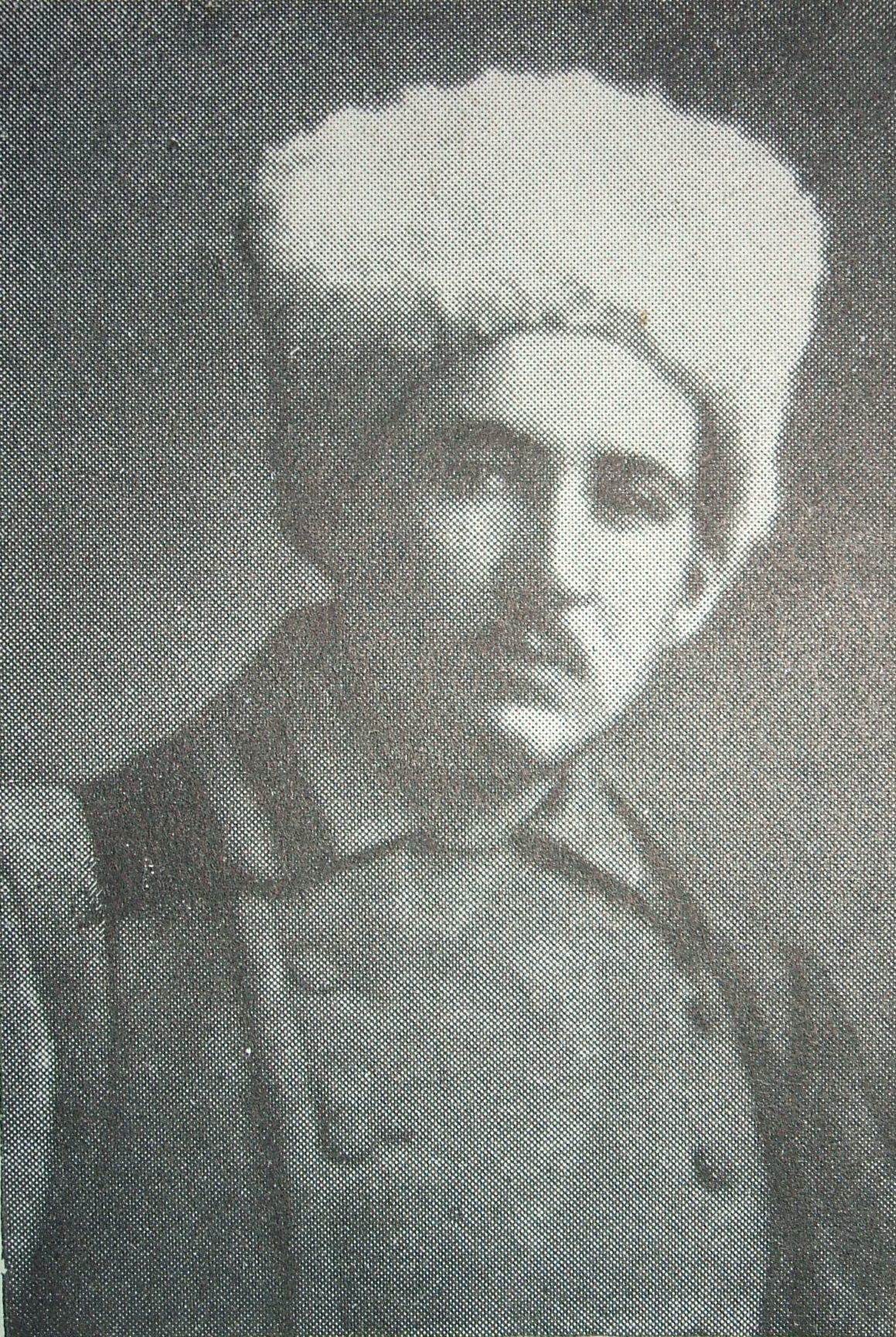 Сестрорецк СПб фото руководителя организации большевиков в Сестрорецке до 1917 года Зофа В.И.